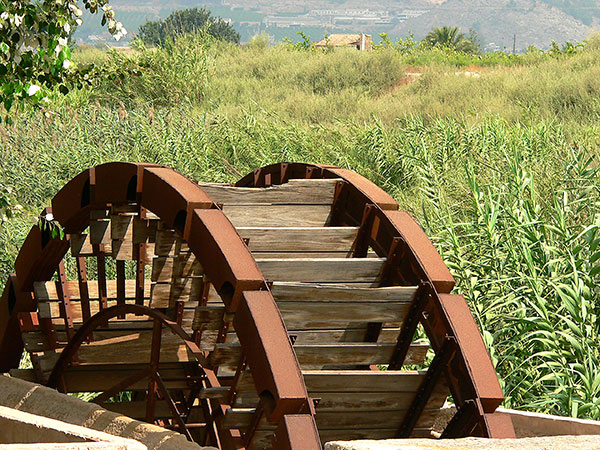 Norias gemelas islámicas en Las Norias, Desemparados, Orihuela.